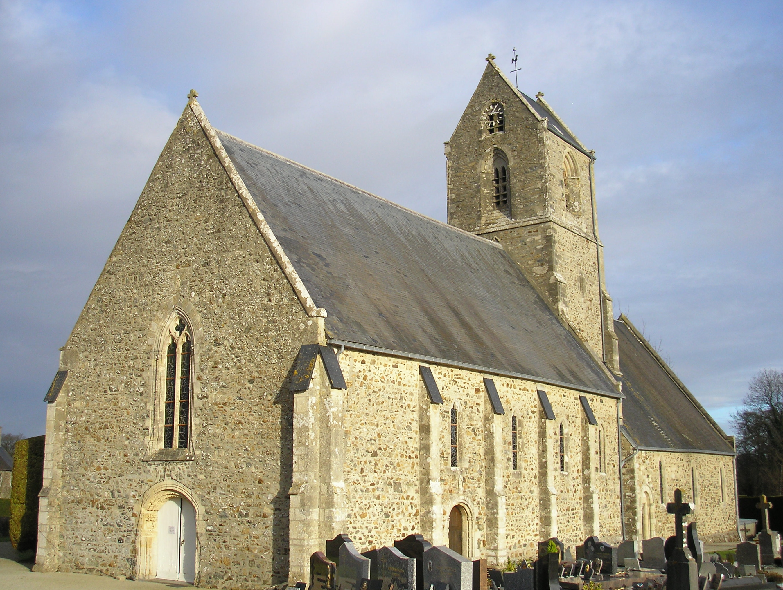 Saint-Martin-d'Aubigny (Normandie, France). L'église Saint-Martin.